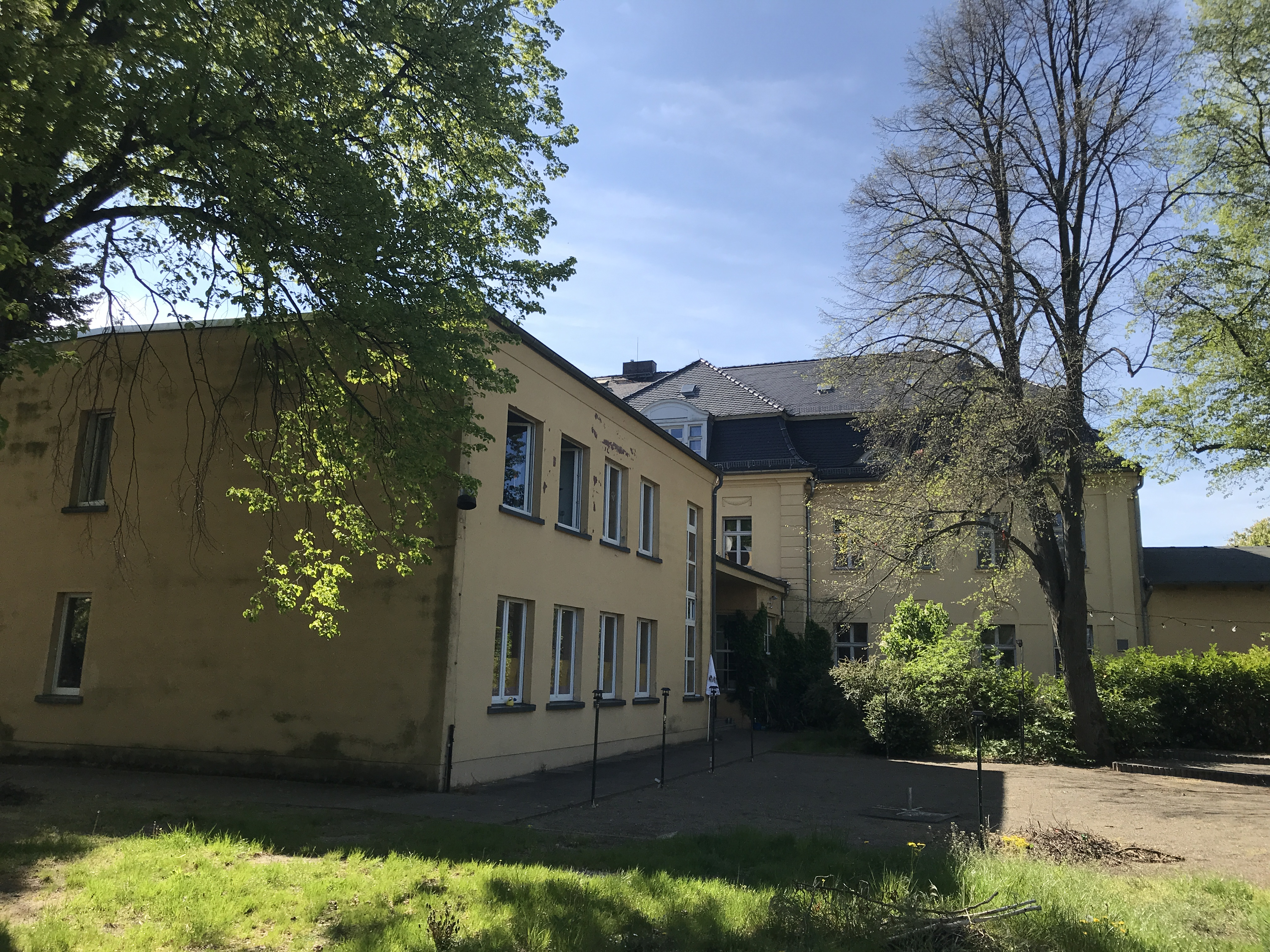 Das Gutshaus Wahlsdorf ist ein Herrenhaus aus den Jahren 1914/1915 in Wahlsdorf, einem Ortsteil der Stadt Dahme/Mark im Landkreis Teltow-Fläming in Brandenburg.